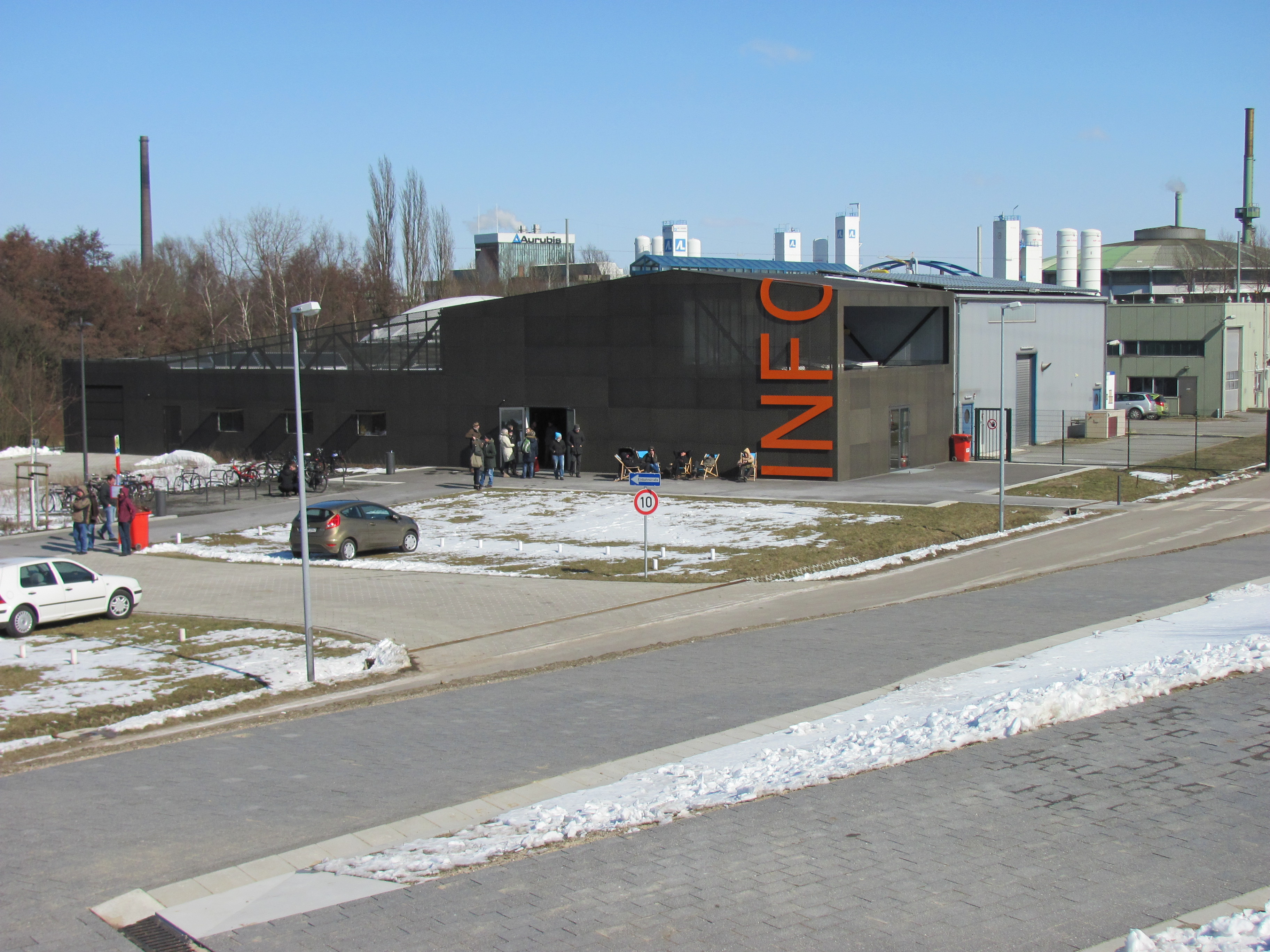 Infozentrum am Fuß des Energiebergs Georgswerder in Hamburg-Wilhelmsburg